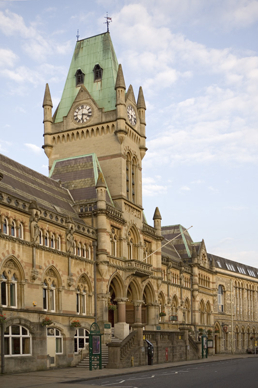 Winchester Guildhall 1871